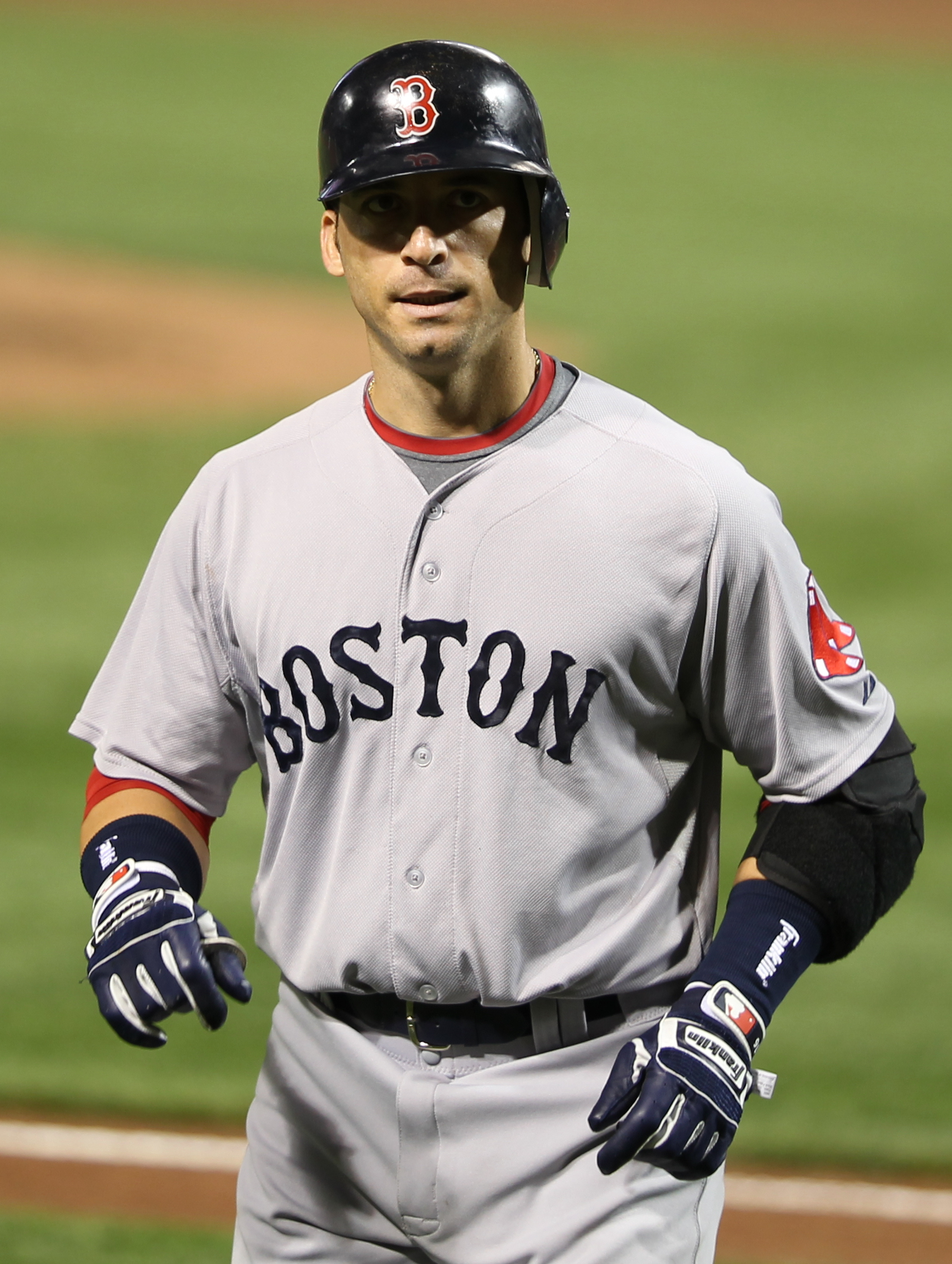 Marco Scutaro